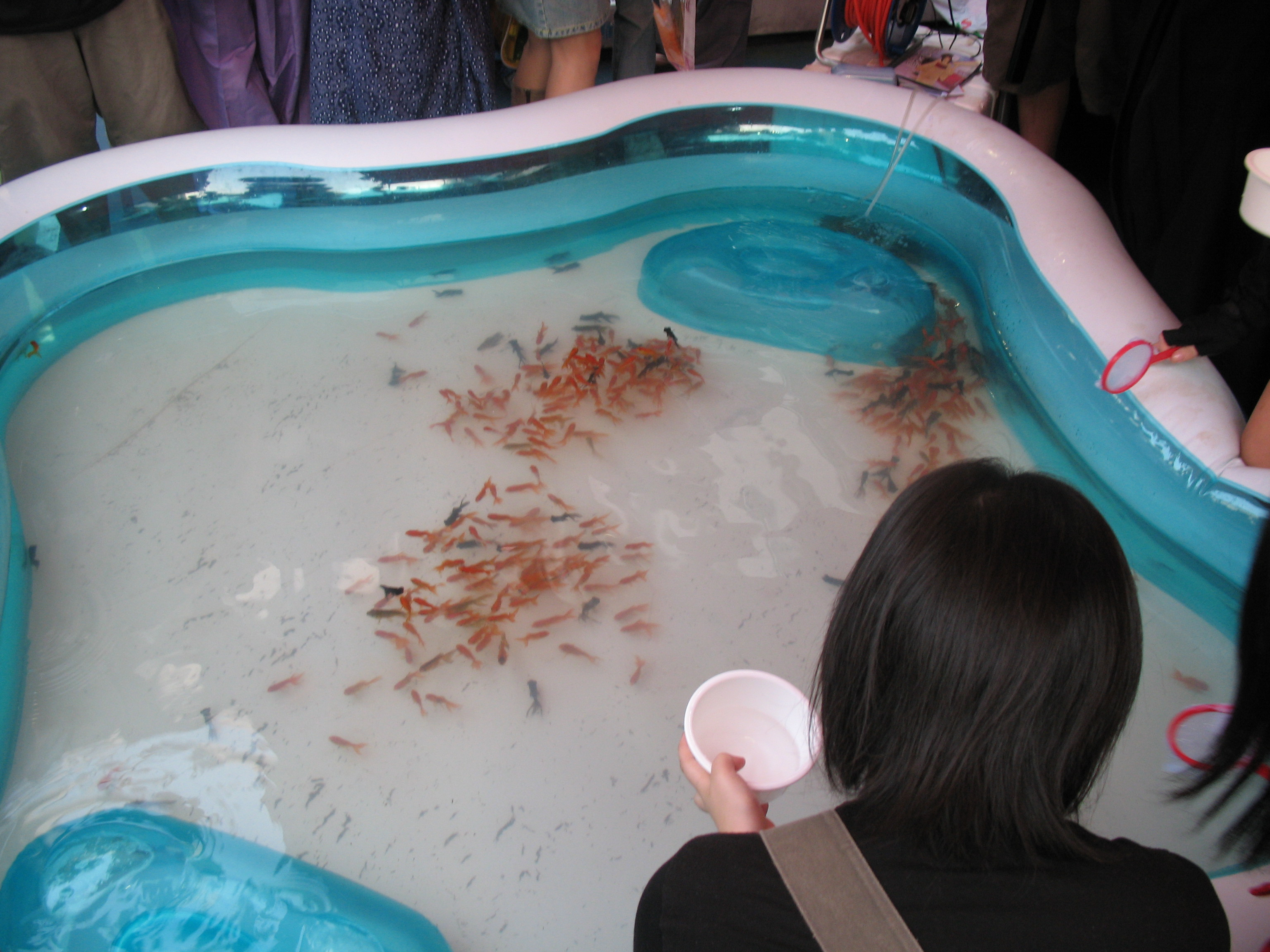 蛍の祭攤位遊戲埸地中的撈金魚屋台